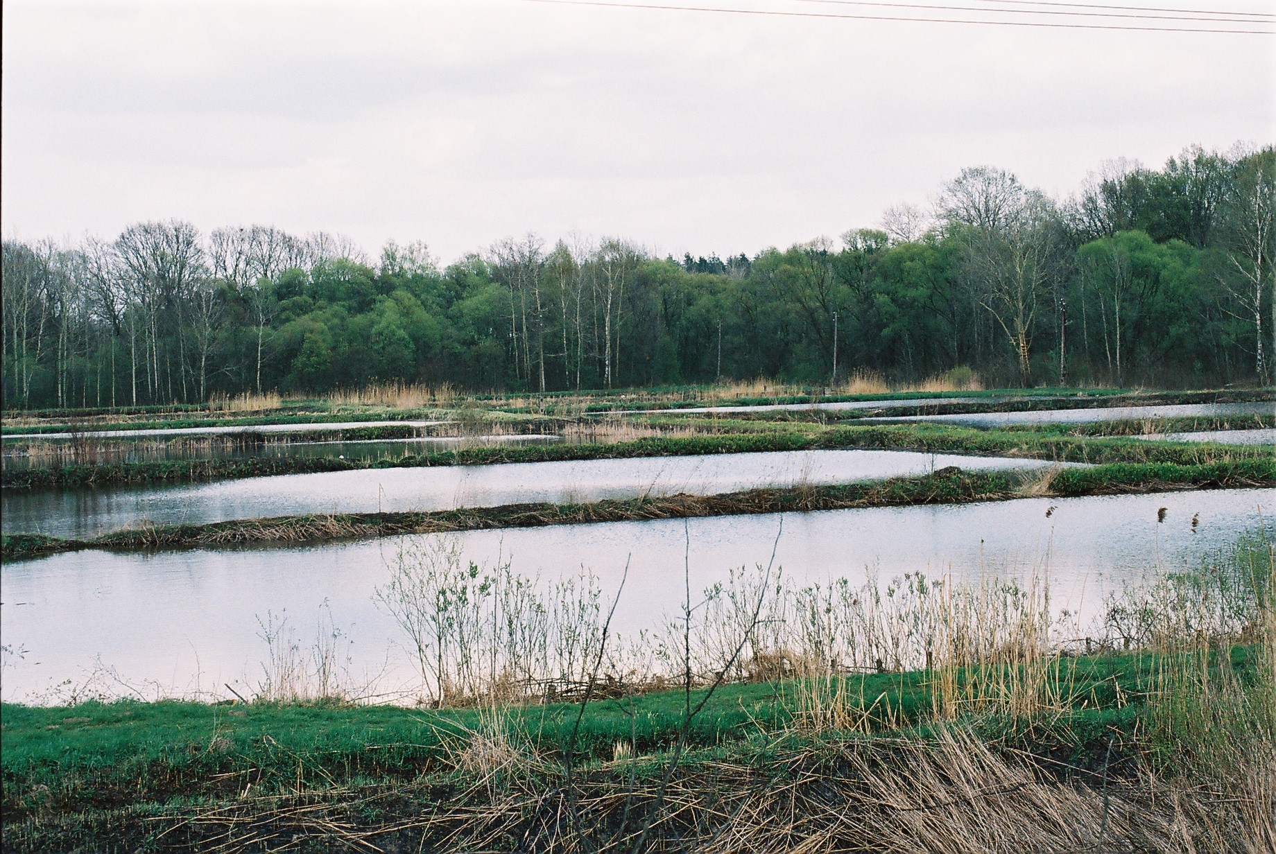 Rybacki Zakład DoświadczalnyŻabieniec Stawy rybne